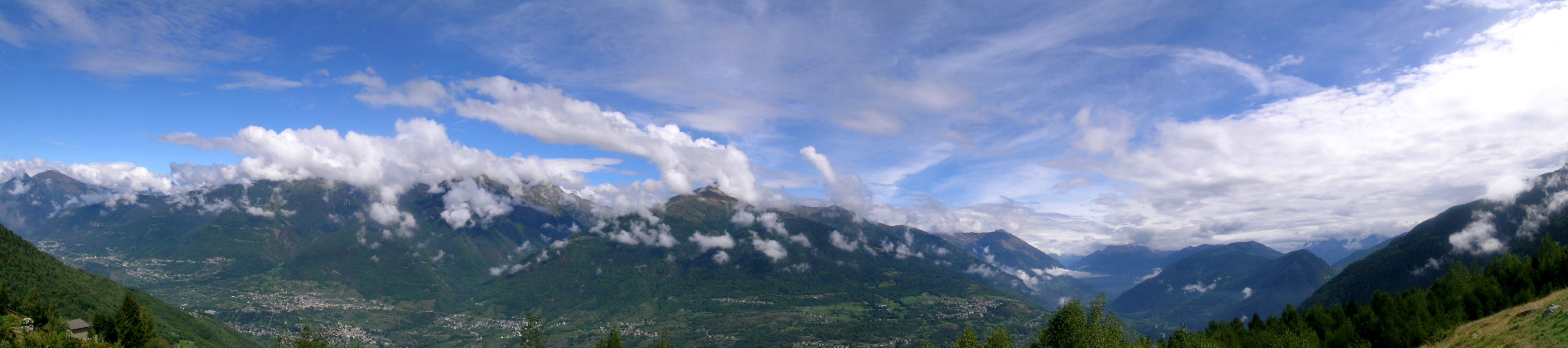 Valtellina Landscape from Piazzola Alp (Sondrio)